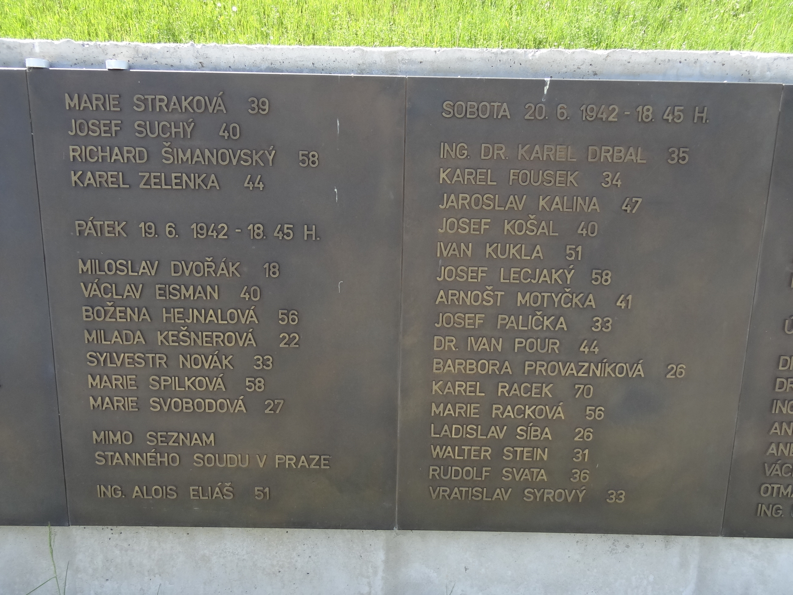 Kobyliská střelnice - pamětní desky se jmény popravených